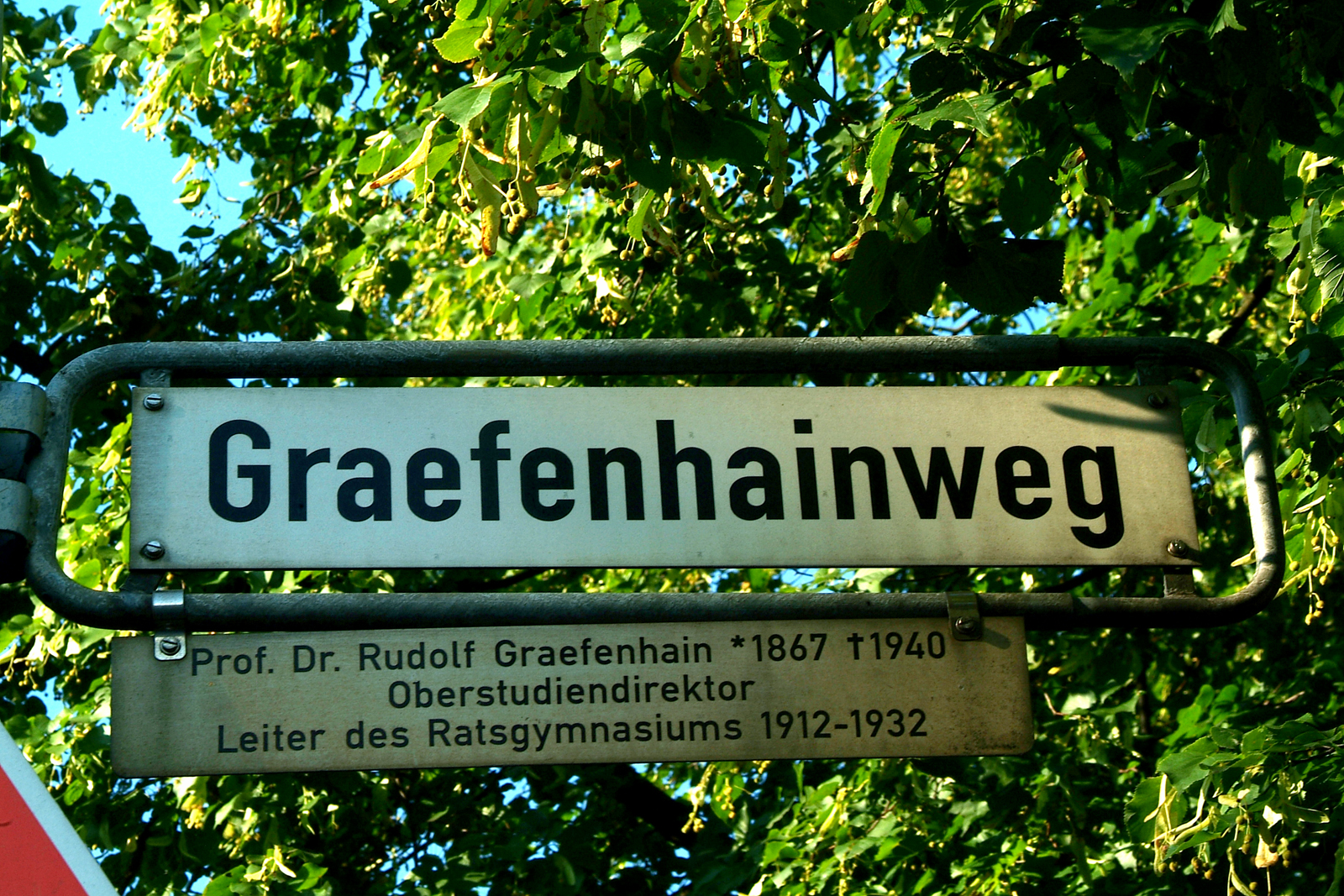 Straßenschild mit Infotafel am Graefenhainweg in Hannover: Prof. Dr. Rudolf Graefenhein, Oberstudiendirektor, Leiter des Ratsgymnasiums 1912-1932 ...